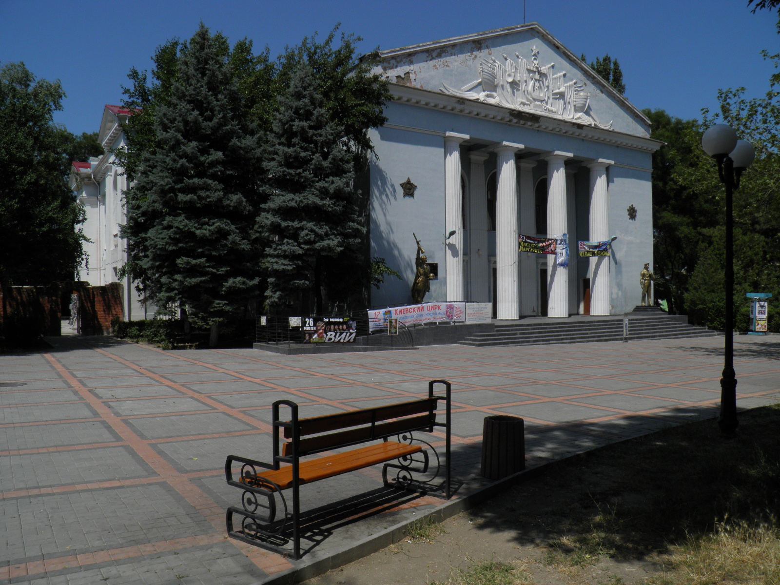 домОФИЦЕРОВ